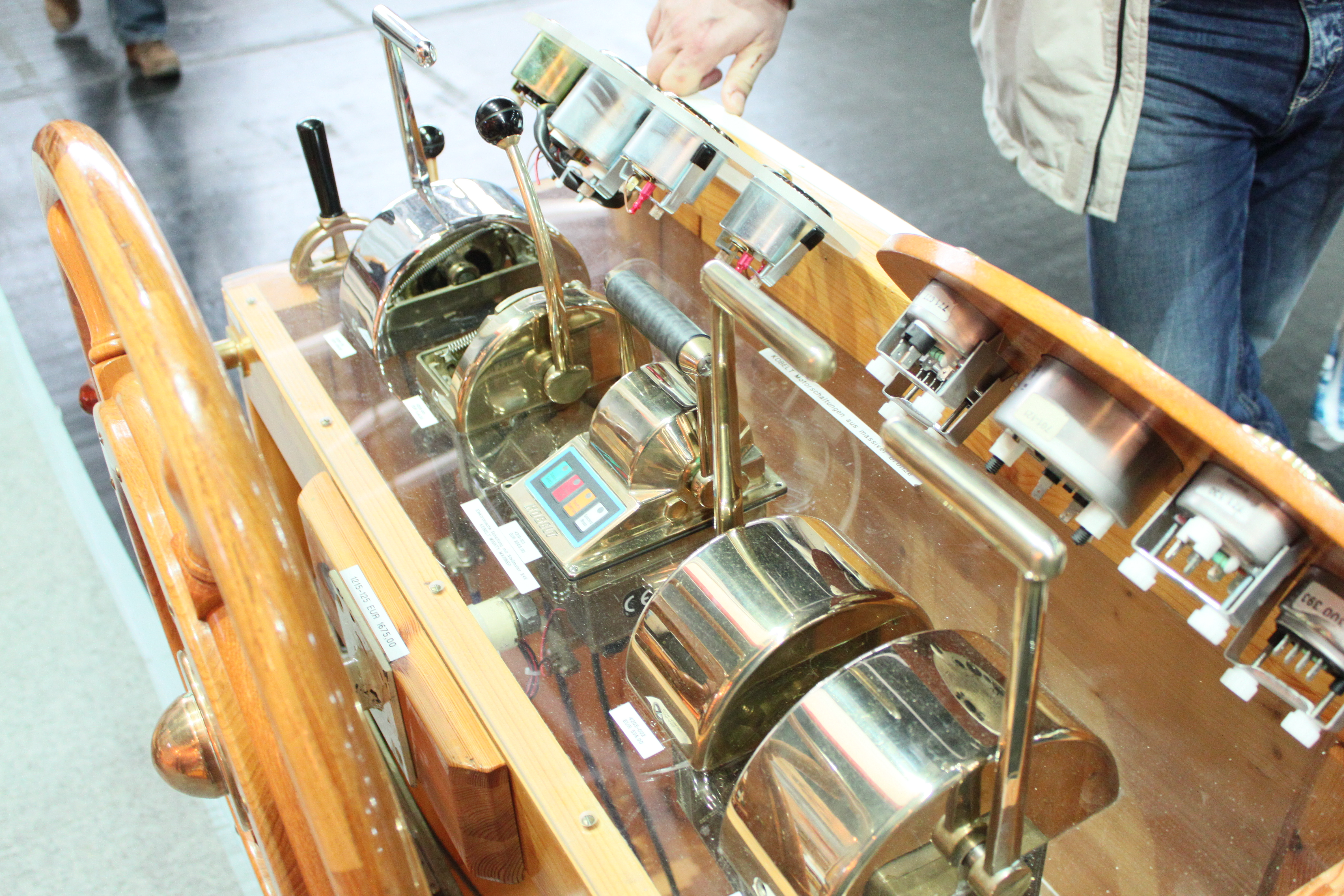 Motorboot Cockpit , gesehen auf der Messe Bremen "Boot 2011"